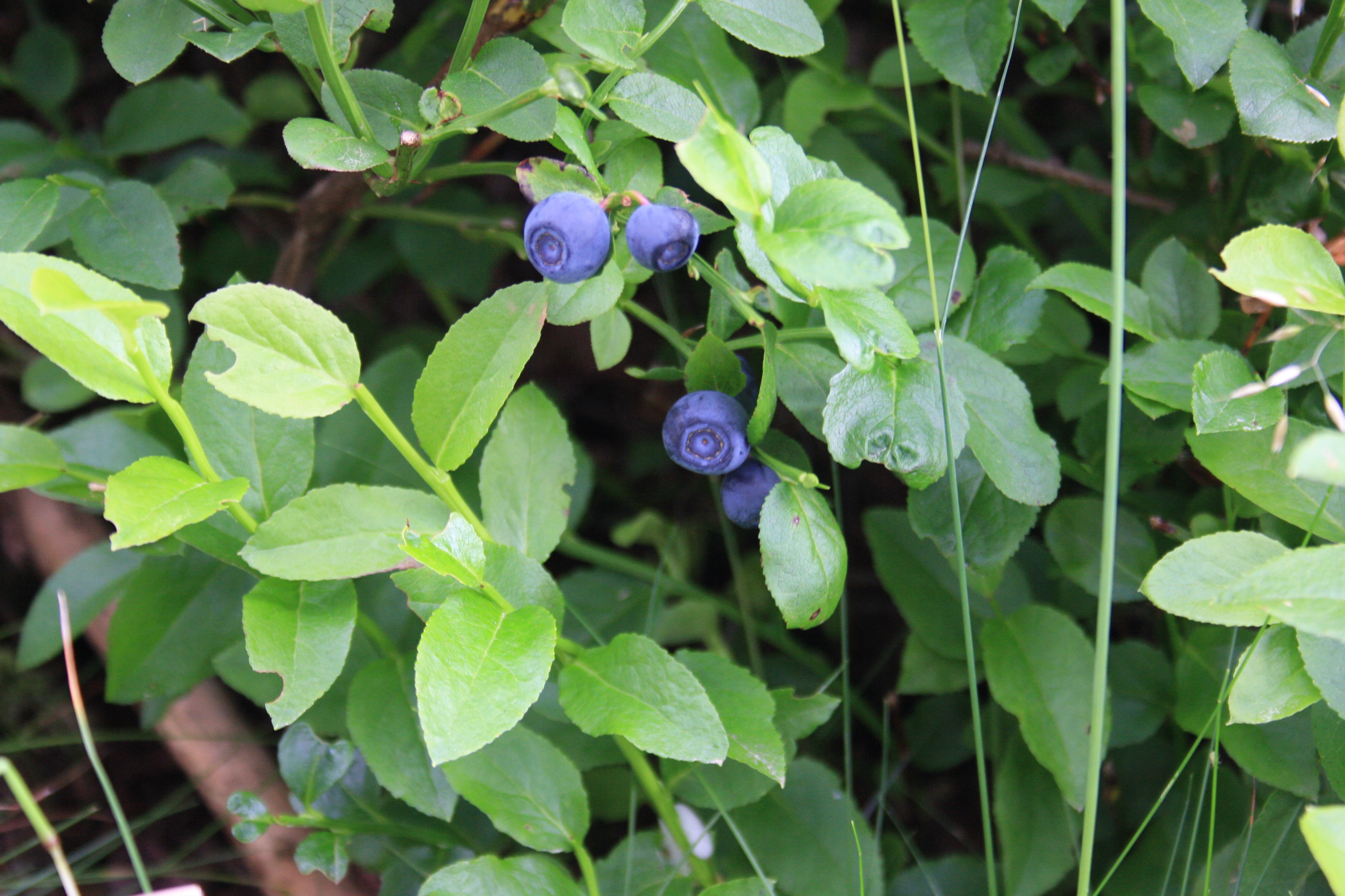 Harzwanderung Oberharz um Braunlage - Wurmberg - An und um die Scherstorklippe